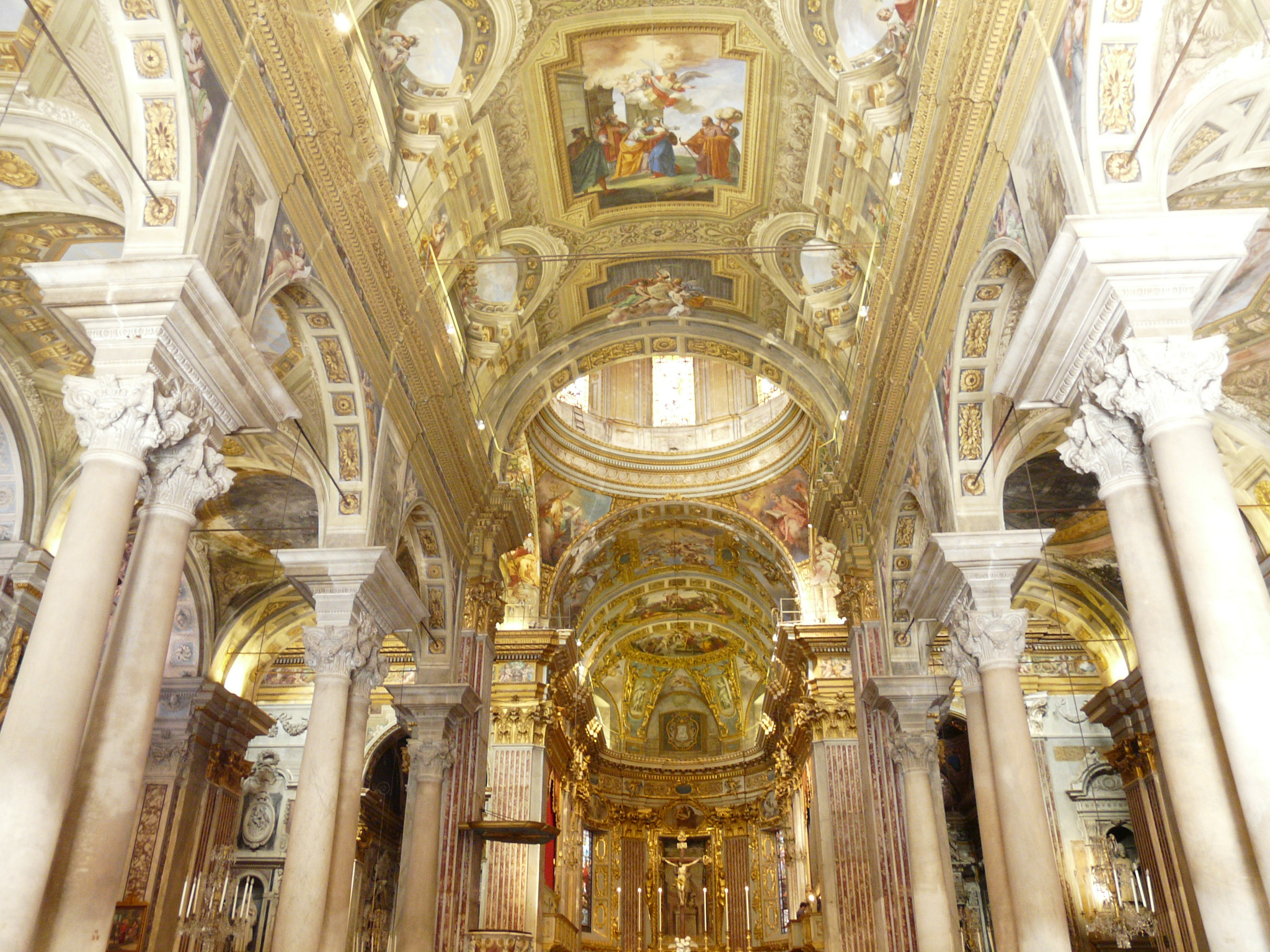 Chiesa di San Giovanni Battista, Finale Ligure, Liguria, Italia